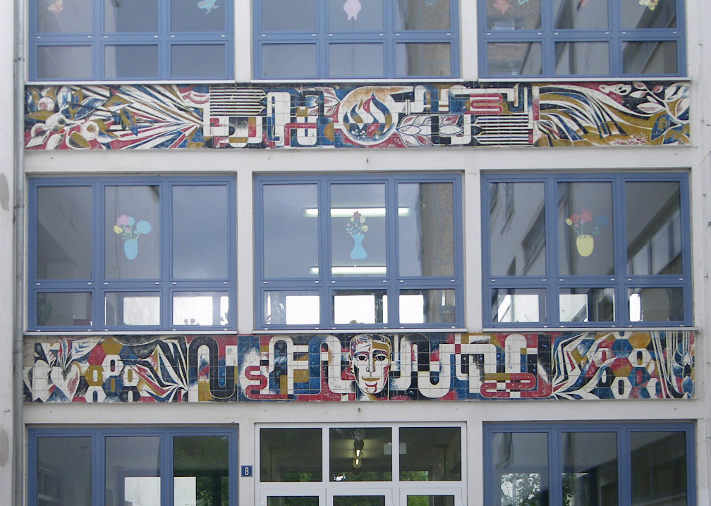 Wilhelm Schmied (1910-1984), Malerei auf Keramik, 1970 Kastanienallee 8